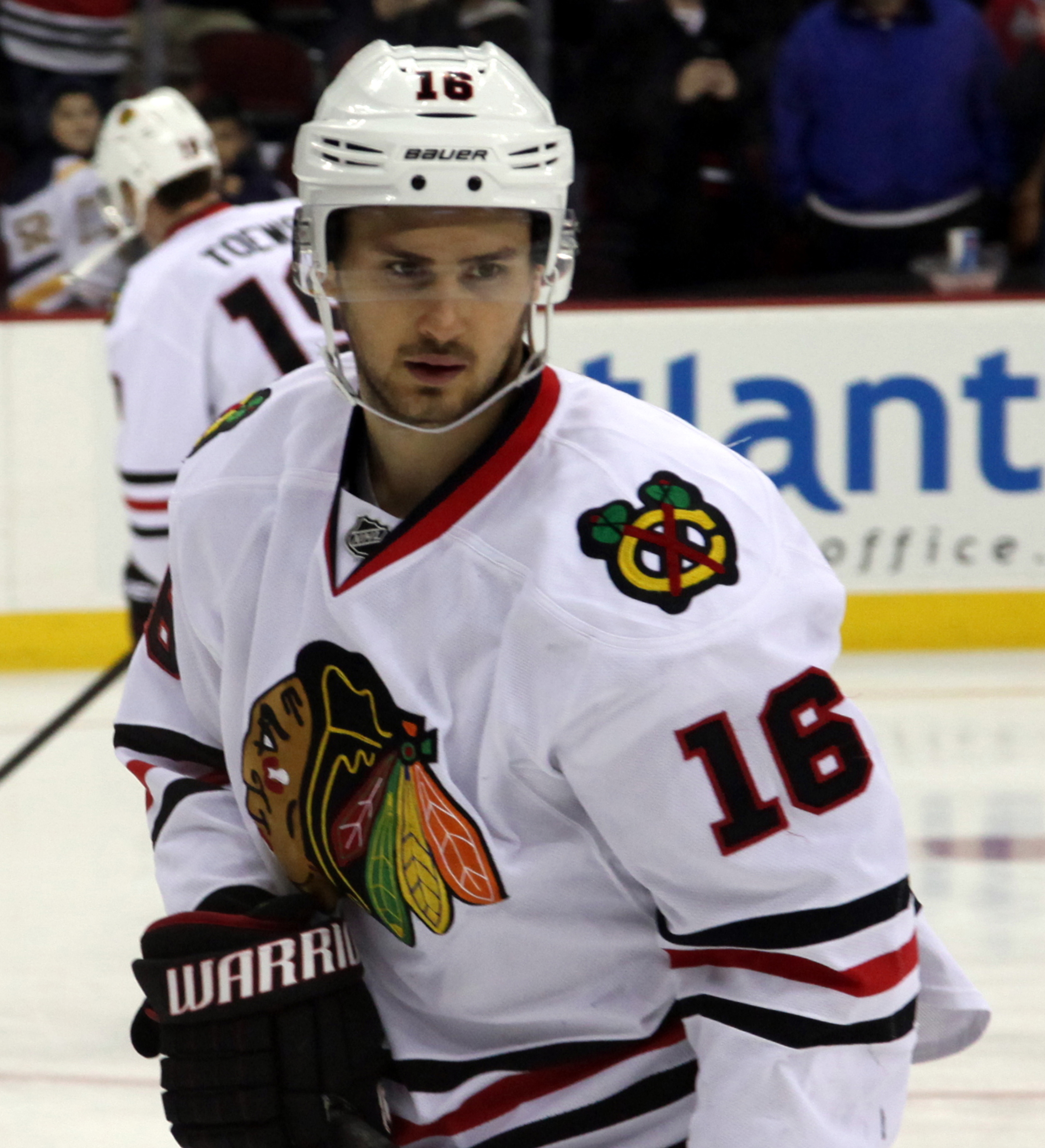 Marcus Kruger in December 2014.